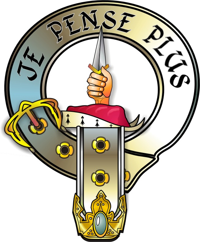 Erskine Crest